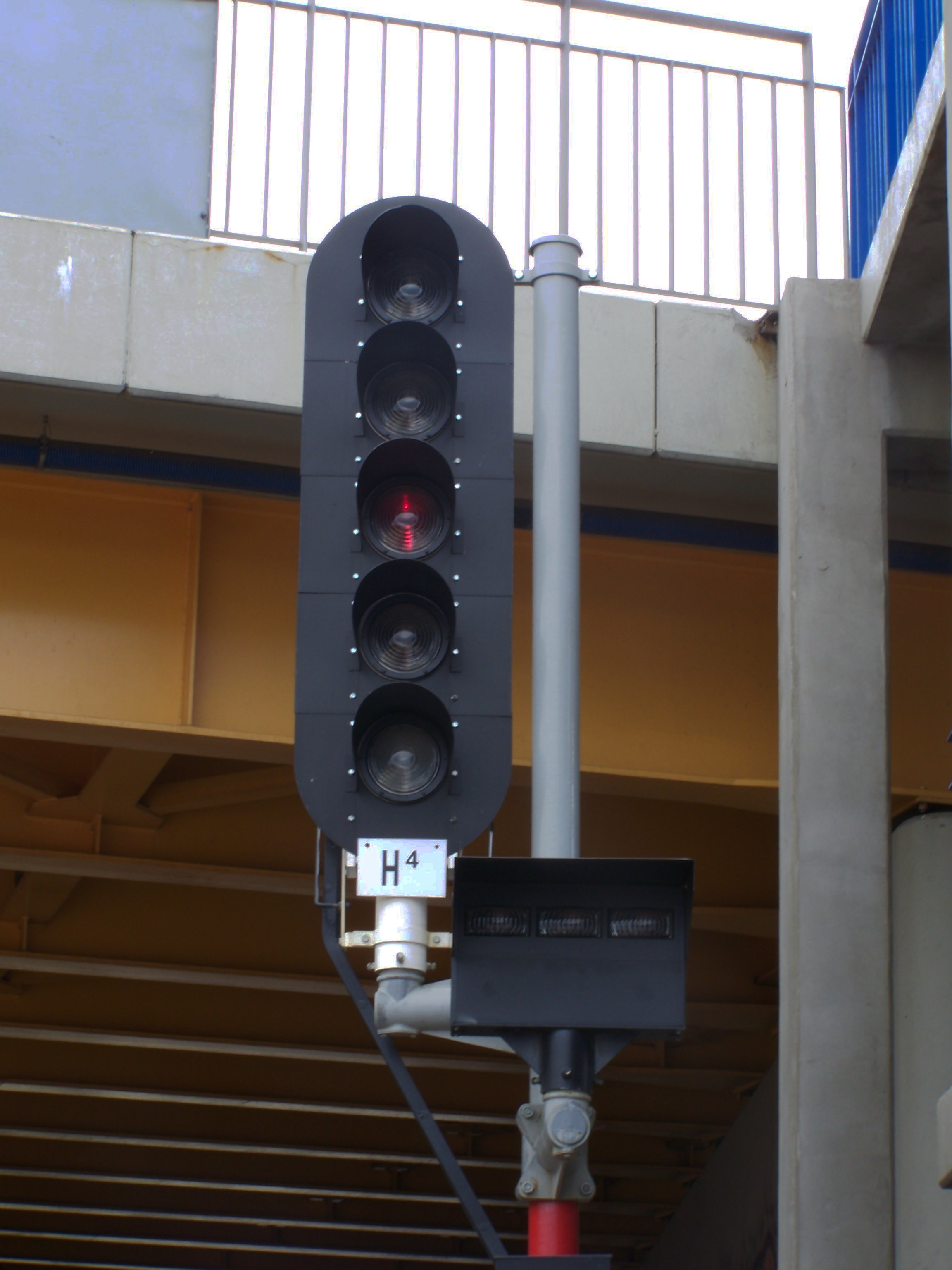 Semafor świetlny z pomarańczowym pasem świetlnym. Warszawa Aleje Jerozolimskie.